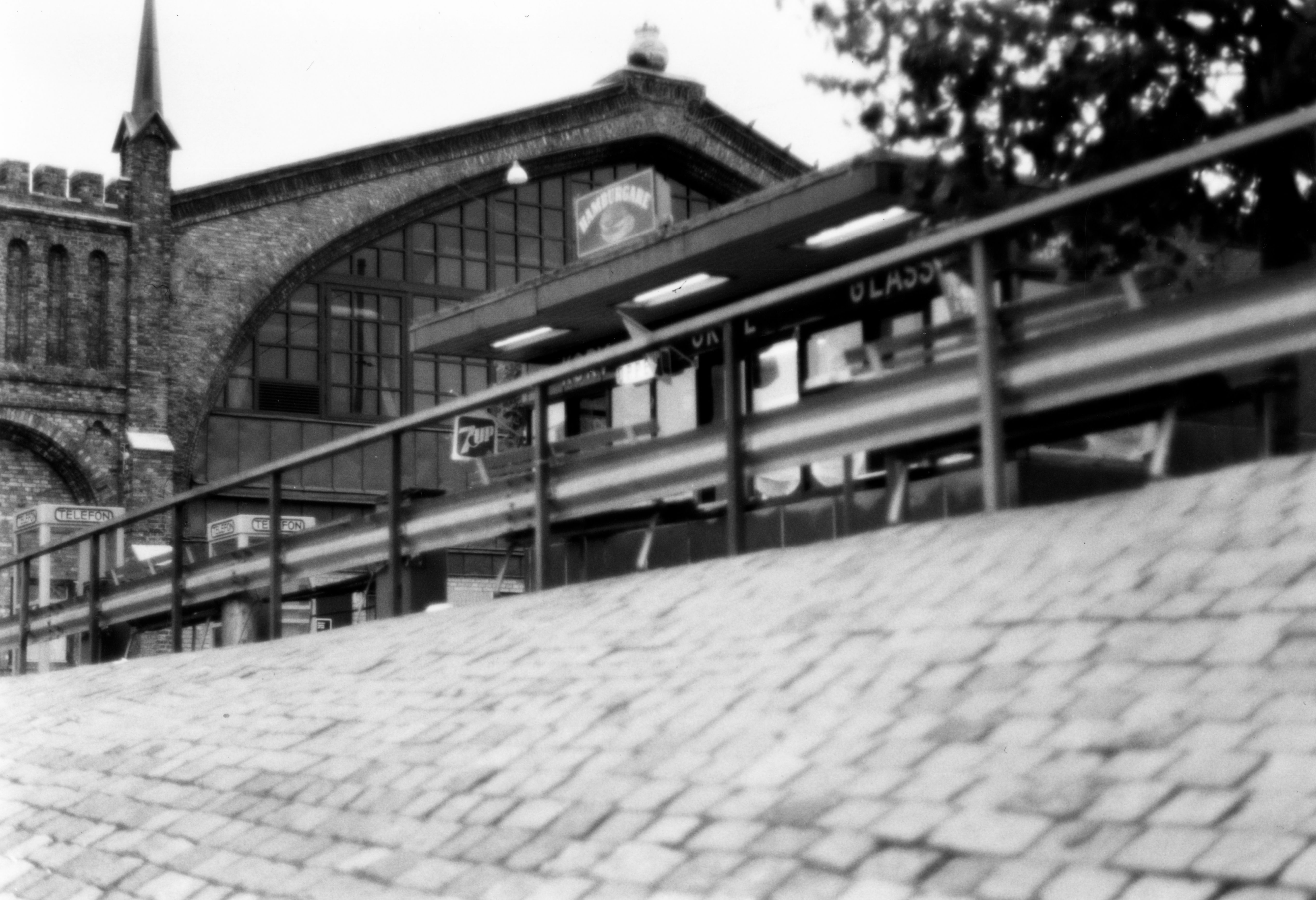 Nils Ericssonsplatsen, Centralen, gatukök (1972).